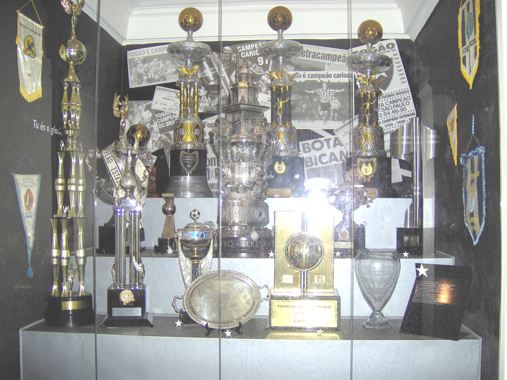 Foto da principal janela da Sala de Troféus do Botafogo de Futebol e Regatas. Aí, estão contidos os troféus do Campeonato Brasileiro de Futebol, Copa Conmebol, Torneio Rio-São Paulo, Campeonatos Cariocas etc.